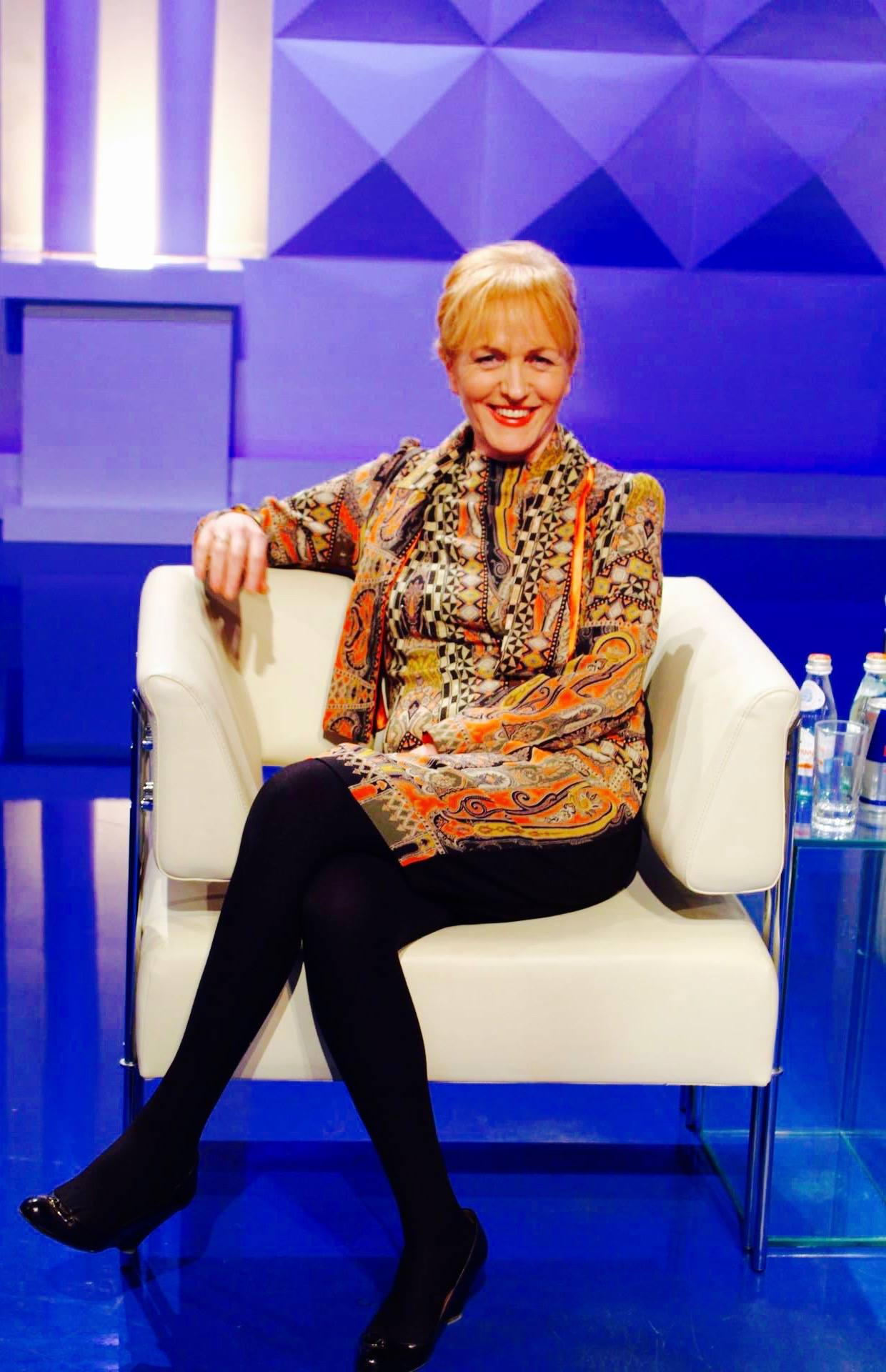 Lajla Pernaska ne Opinion TV KLAN per "Muziken qytetare ne vite", 2016